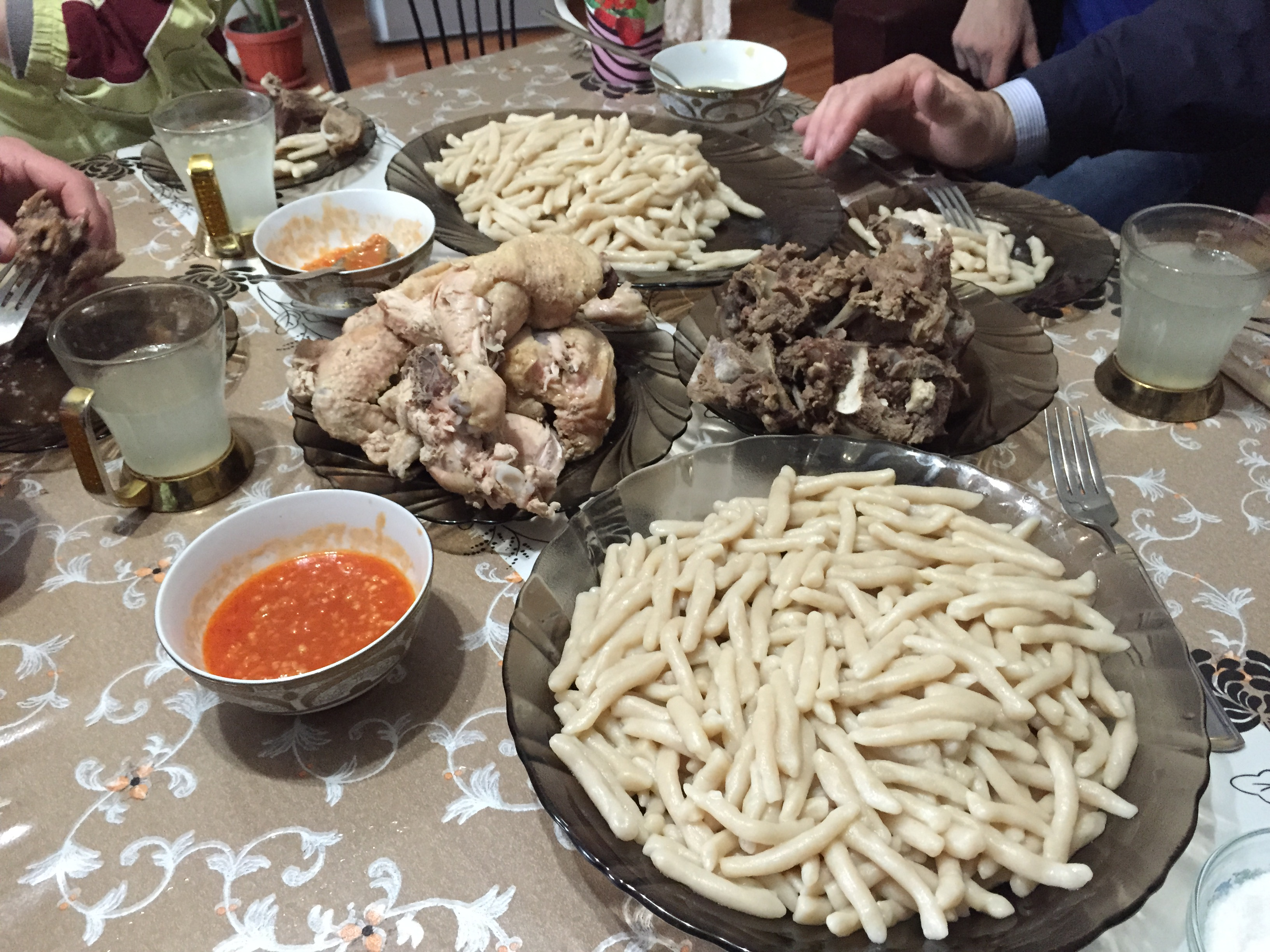 Северо-Кавказское национальное блюдо - хинкал